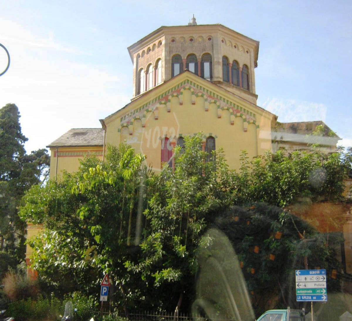 Rapallo, Angelicaanse Kerk St.Joris.